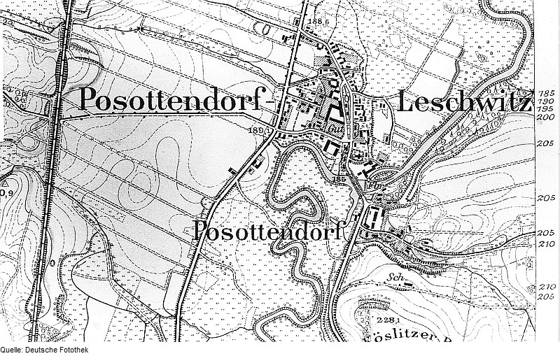 Original image description from the Deutsche Fotothek Görlitz-Weinhübel (bis 1936 Leschwitz). Meßtischblatt, Sekt. Görlitz, 1886